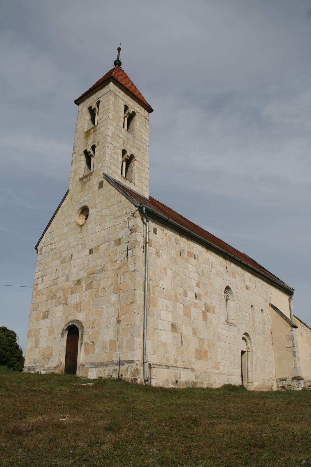 Református templom (Felsőregmec, Petőfi u.) This is a photo of a monument in Hungary. Identifier: 2756